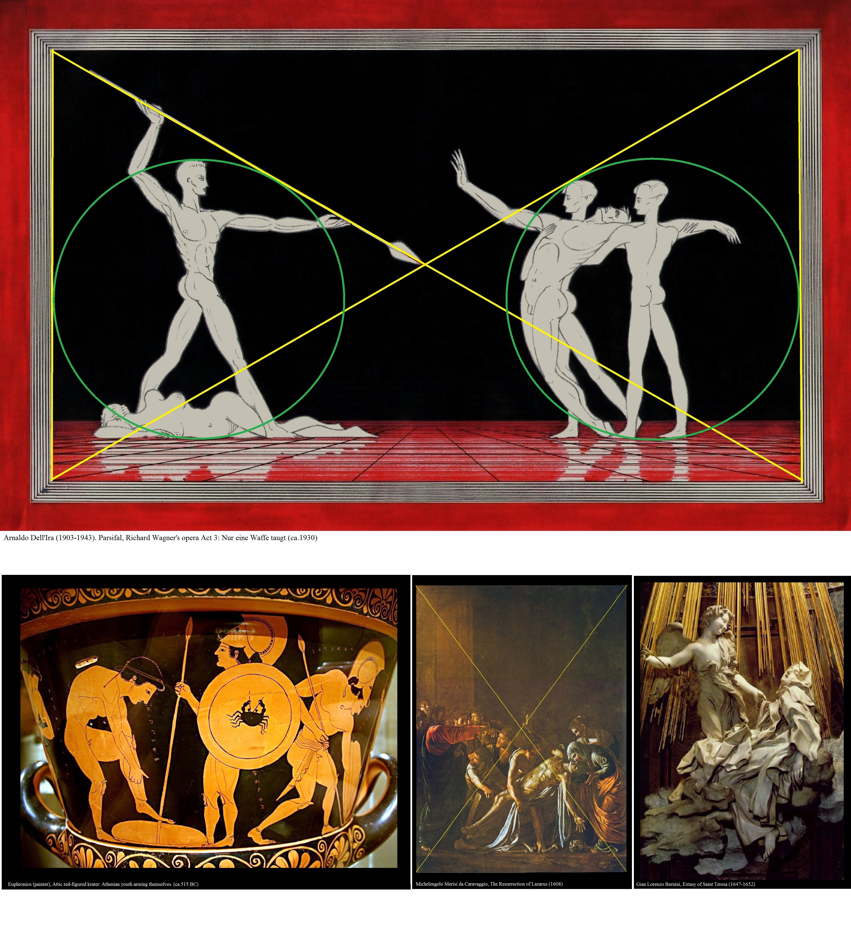 Arnaldo Dell'Ira (1903-1943), Wagner's Parsifal Act 3: Nur eine Waffe taugt. Confronto tra il tracciato proporzionale sotteso al disegno di Arnaldo Dell'Ira e le opere antiche a cui è ispirato